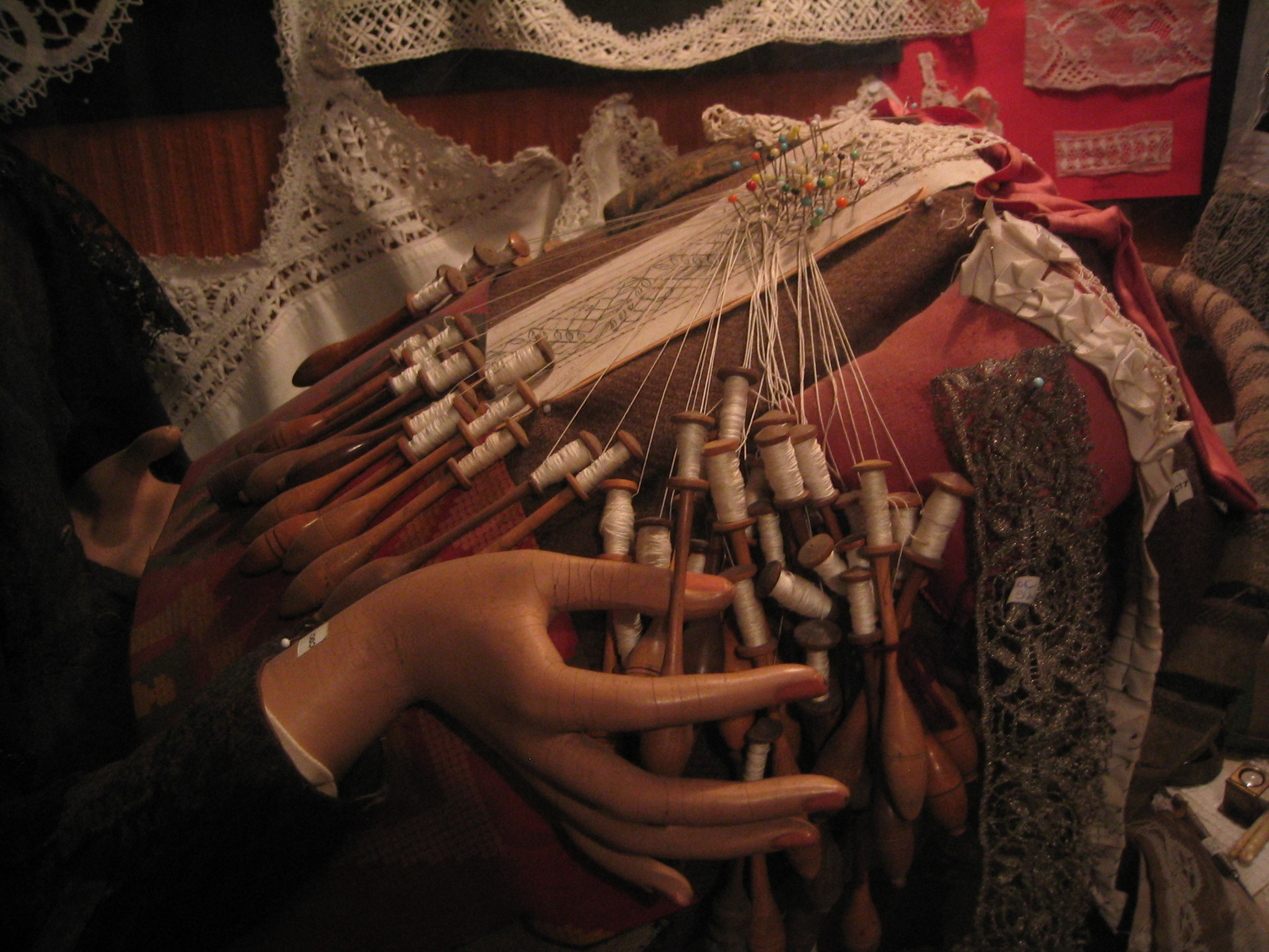 Le travail de la dentelle dans les Vosges (Ferme-musée de la Soyotte, près de Saint-Dié-des-Vosges)